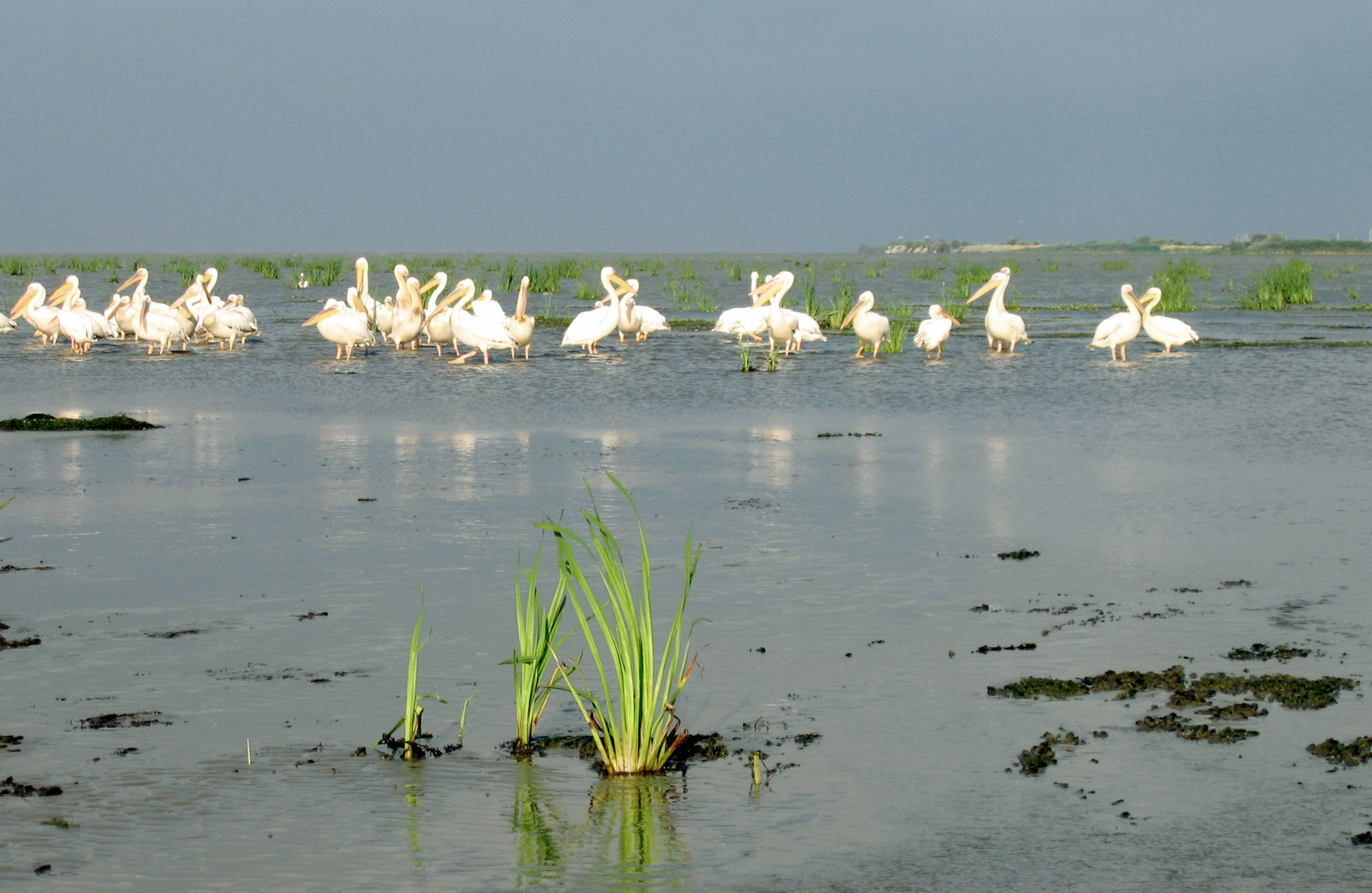 White Pelicans in Denube Delta